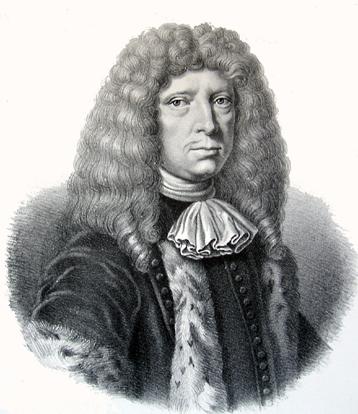 Peder Hansen Resen, Danish historian